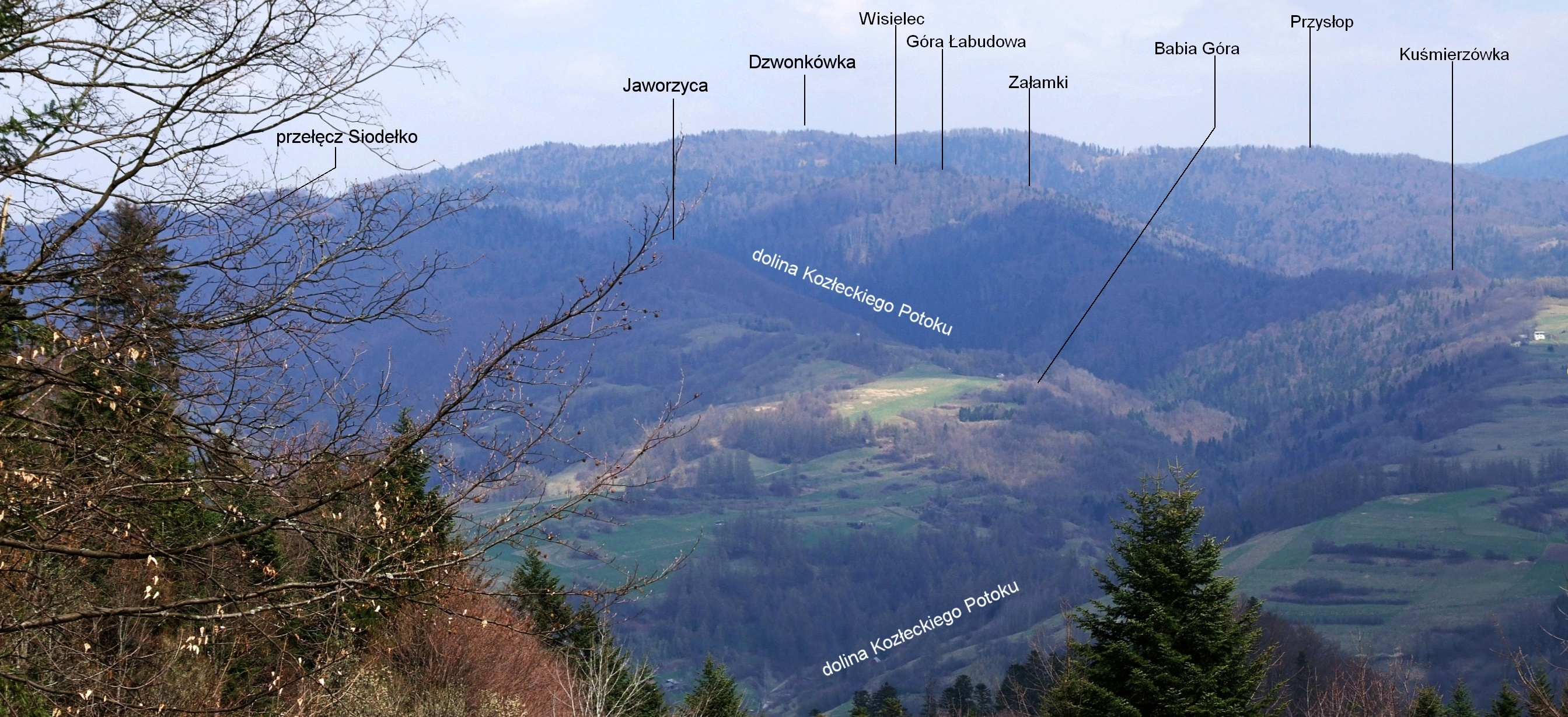 Opisana panorama Pasma Radziejowej (Beskid Sądecki) z polany Kurnikówka (Pieniny).